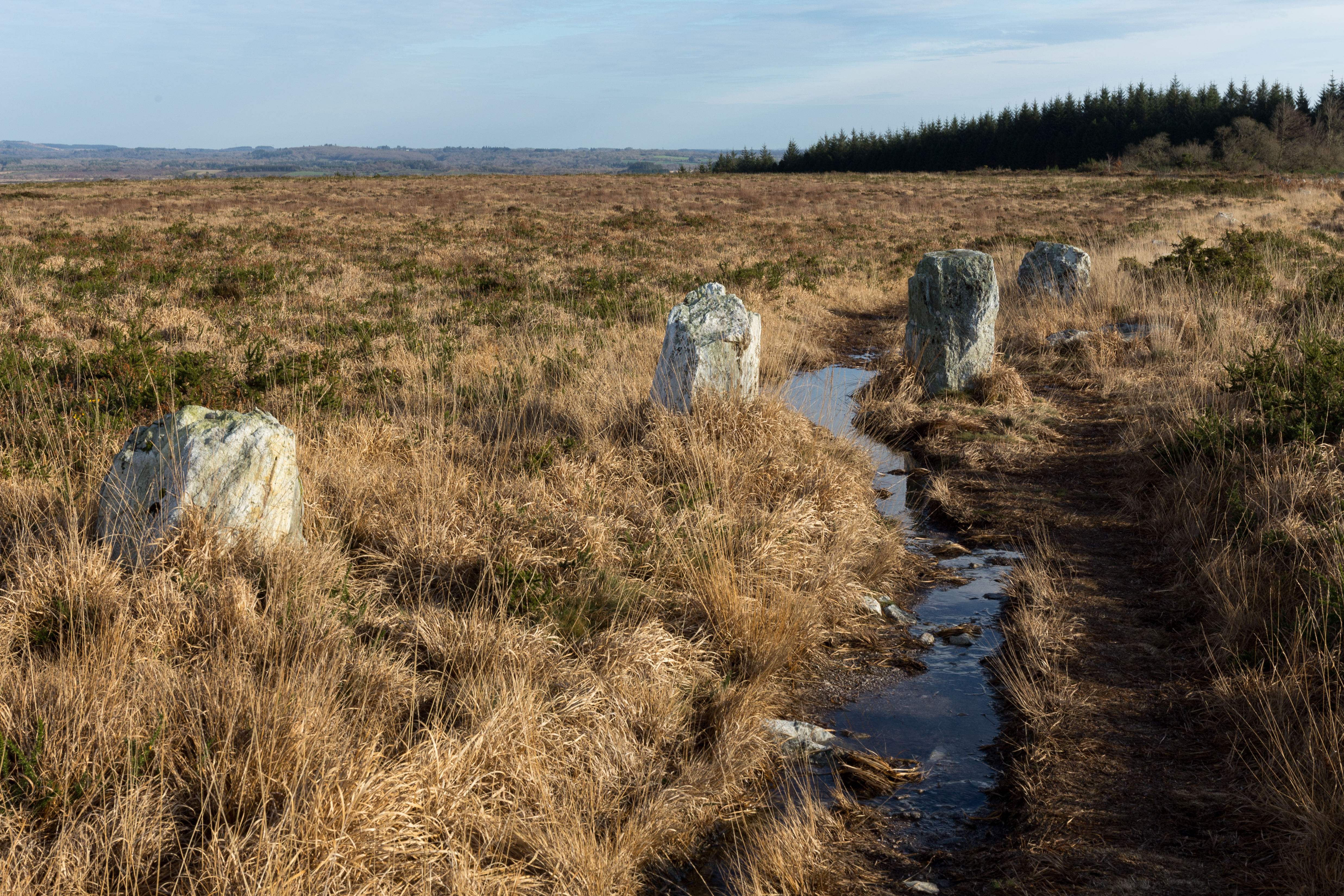 An Eured Vein e Brasparzh.